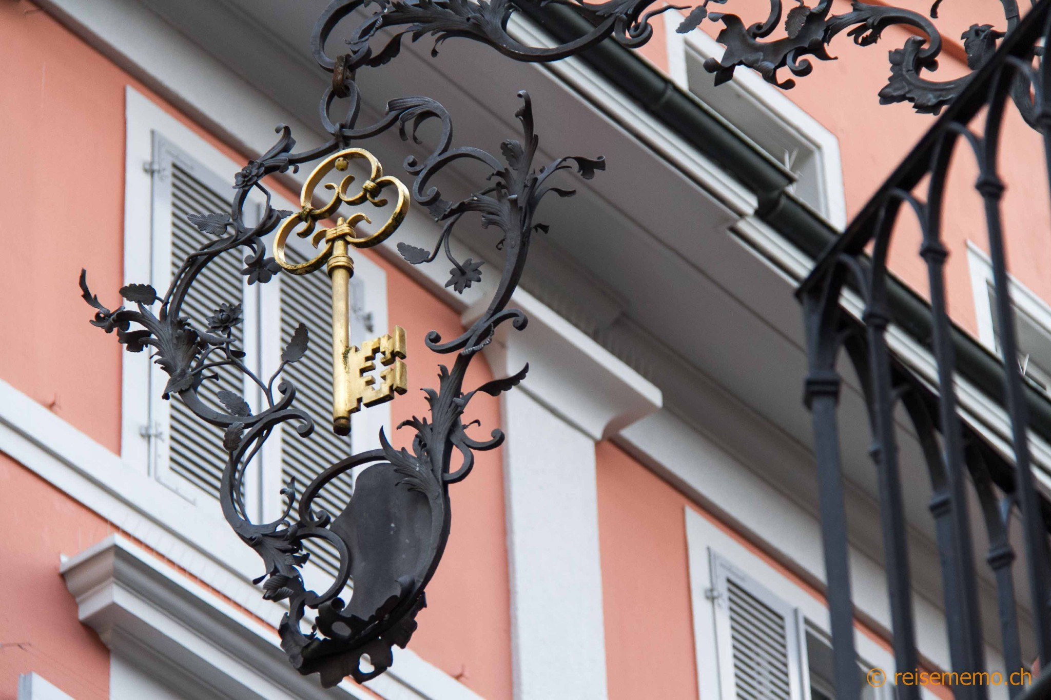 Restaurant Goldener Schlüssel